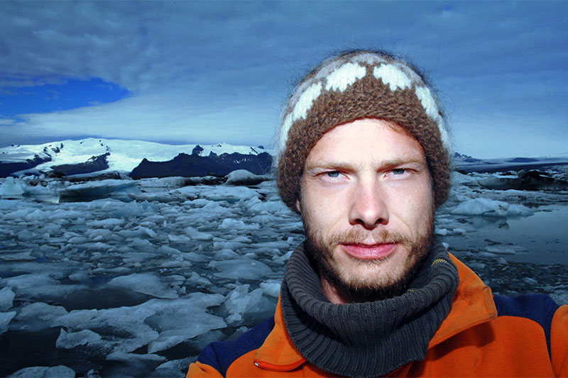 Ein Porträt von Heiko Gärtner vor einer mit Eisschollen übersäten Meerenge und verschneiten Bergen im Hintergrund.